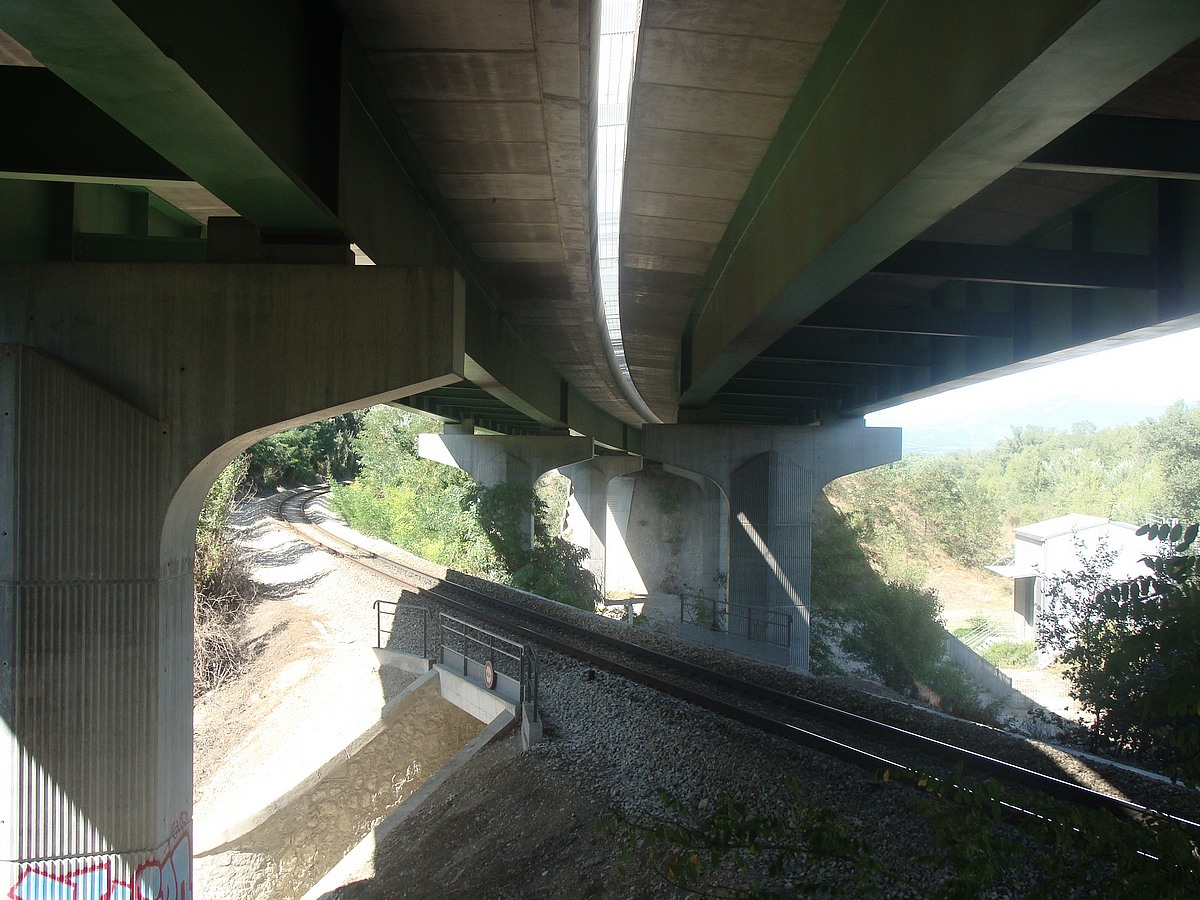 Viaduc de l'A 51 franchissant de biais la voie ferrée Marseille - Briançon à la hauteur de Lurs (Alpes-de-Haute-Provence)